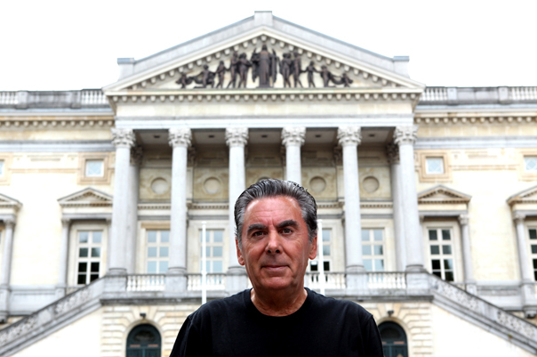 Stan Lauryssens